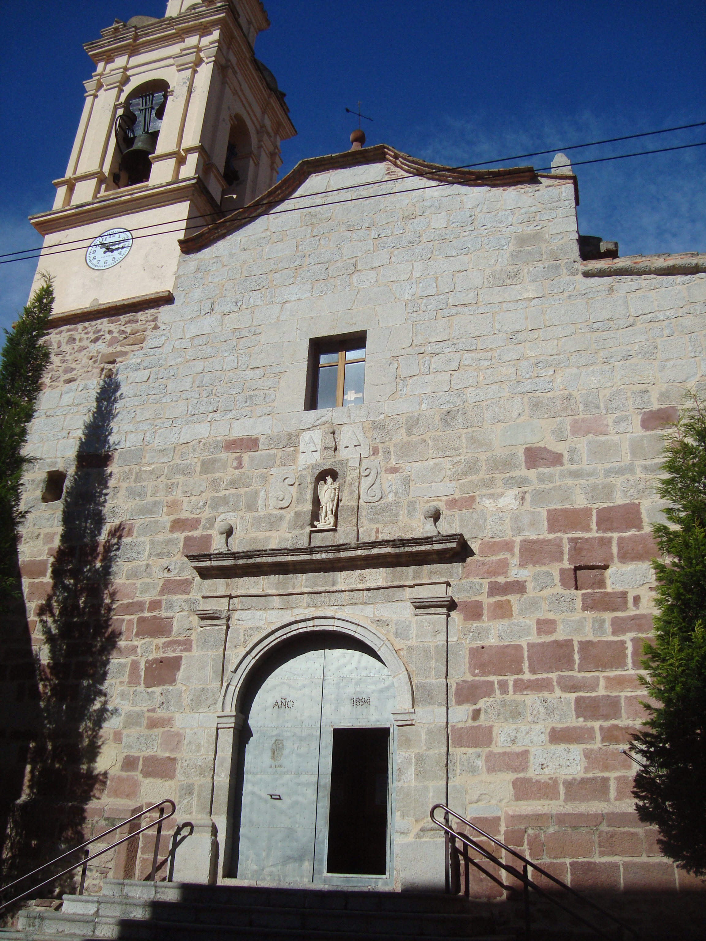 Església parroquial de Sant Miquel Arcàngel (la Pobla Tornesa) 05.094-001.